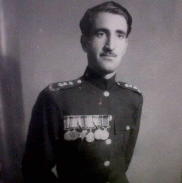 القائد نواف الجبر الحمود